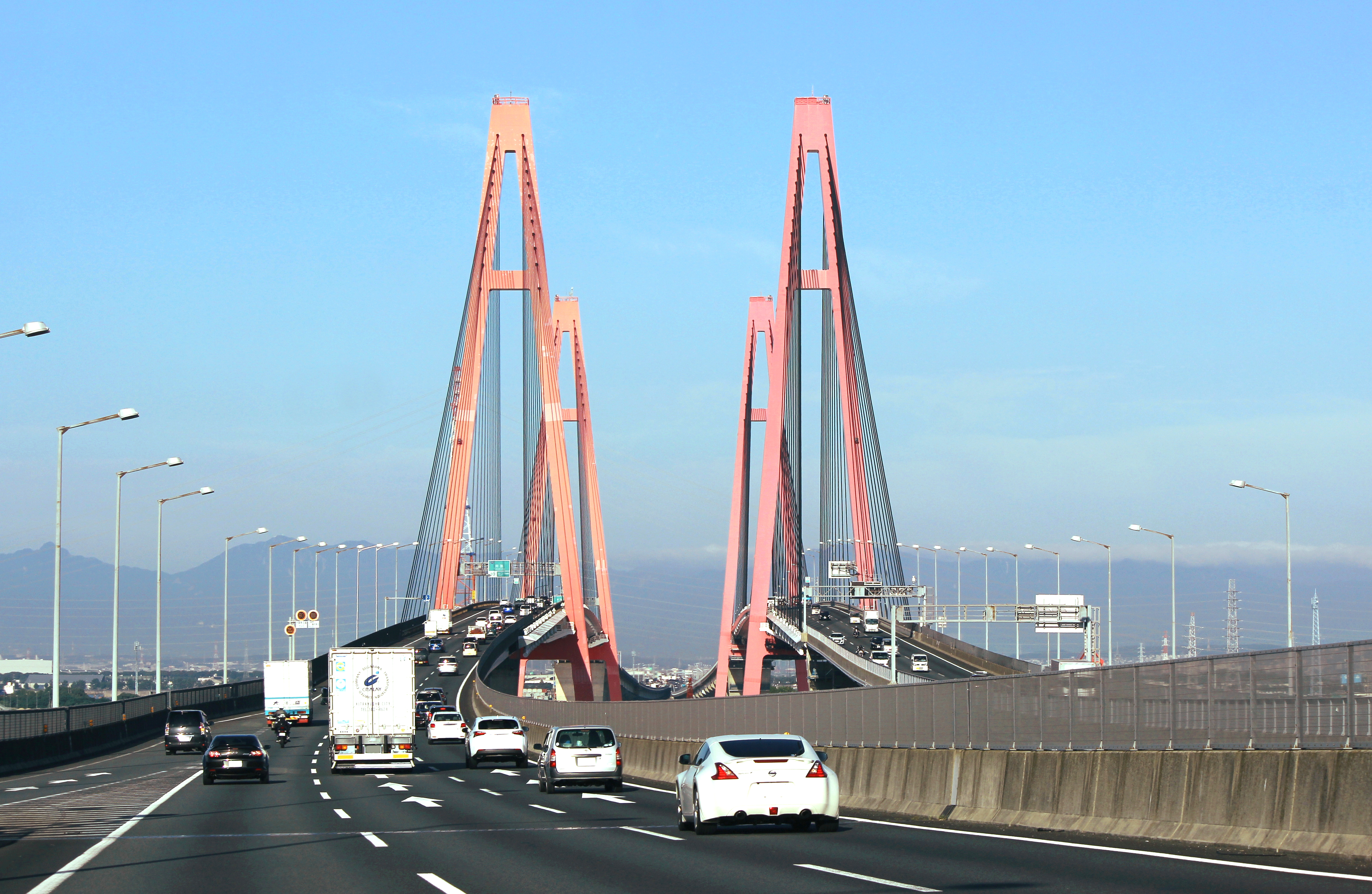 名古屋環状2号線 海上区間（下り）